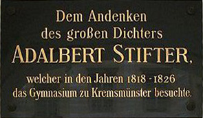 Erinnerunstafel an Adalbert Stifter